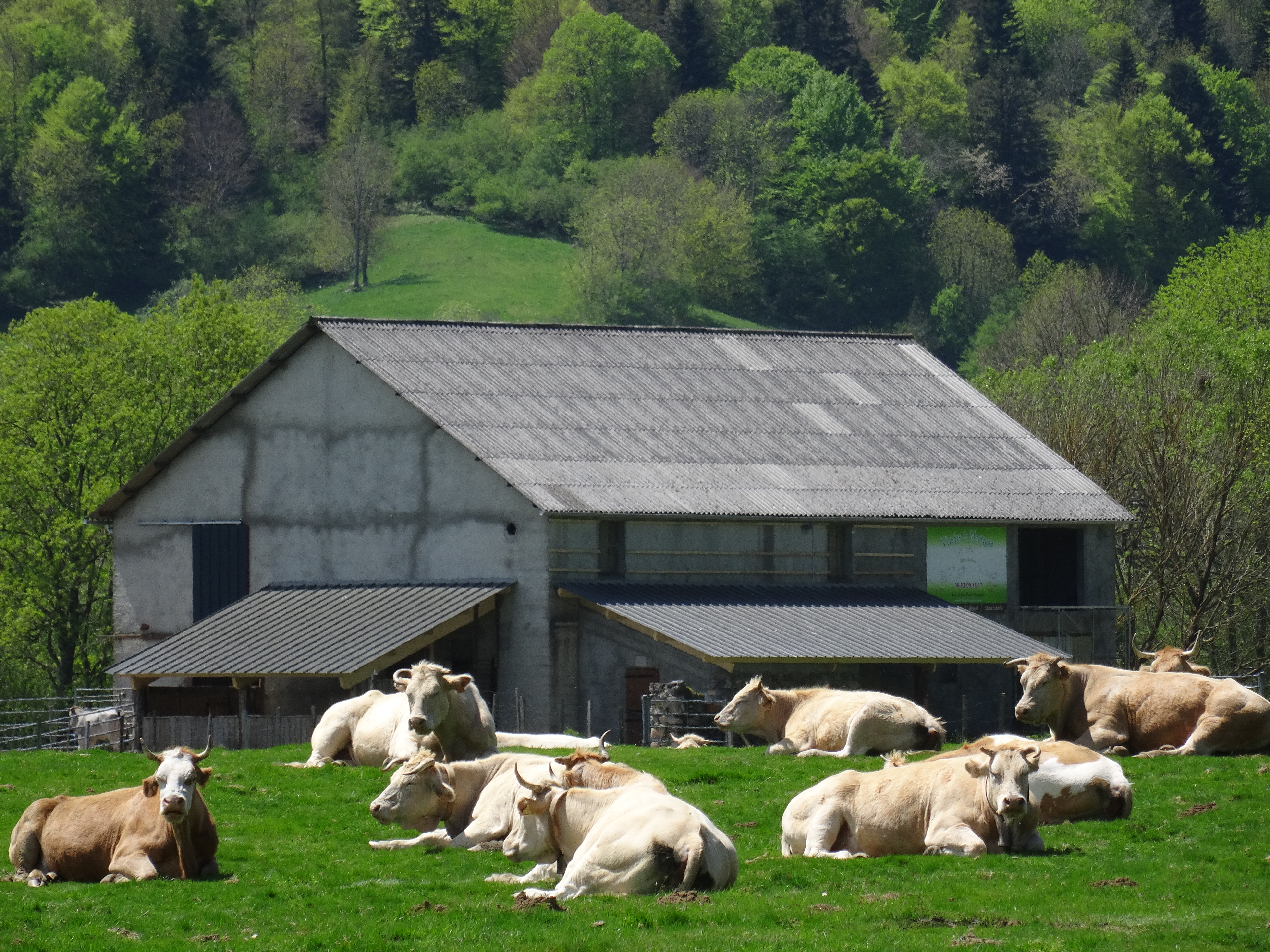 Elevage bovin sur le plateau du Bénou